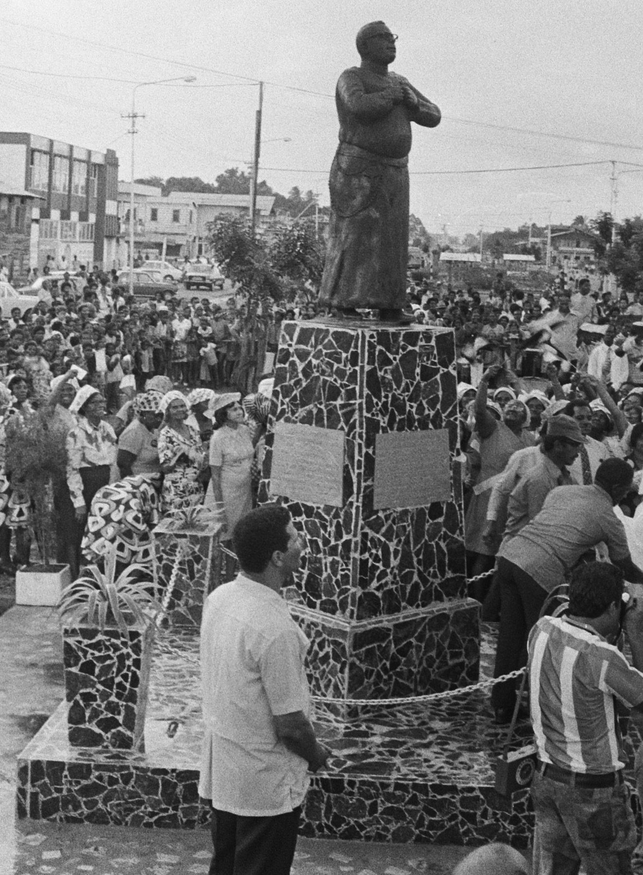 Collectie / Archief : Fotocollectie Anefo Reportage / Serie : [ onbekend ] Beschrijving : Suriname, bijeenkomsten; Surinaamse televisie in actie, bijeenkomst t.g.v. onhulling standbeeld pater Weidmann, Arron legt krans Datum : 1 april 1975 Locatie : Suriname Trefwoorden : Standbeelden, bijeenkomsten Persoonsnaam : ARRON Fotograaf : Verhoeff, Bert / Anefo Auteursrechthebbende : Nationaal Archief Materiaalsoort : Negatief (zwart/wit) Nummer archiefinventaris : bekijk toegang 2.24.01.05 Bestanddeelnummer : 927-8379